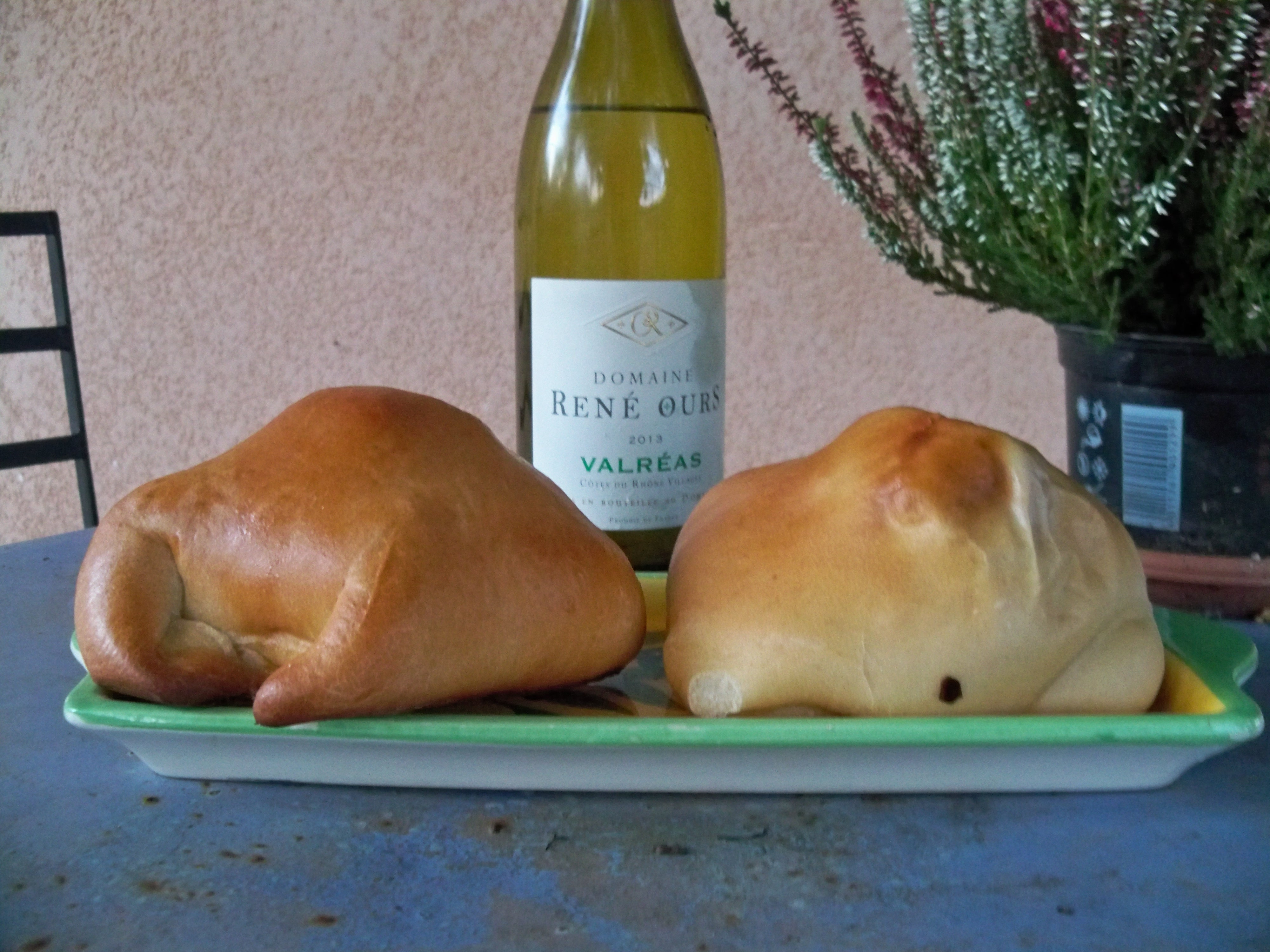 Pain coing, spécialité provençale à base de coing entier